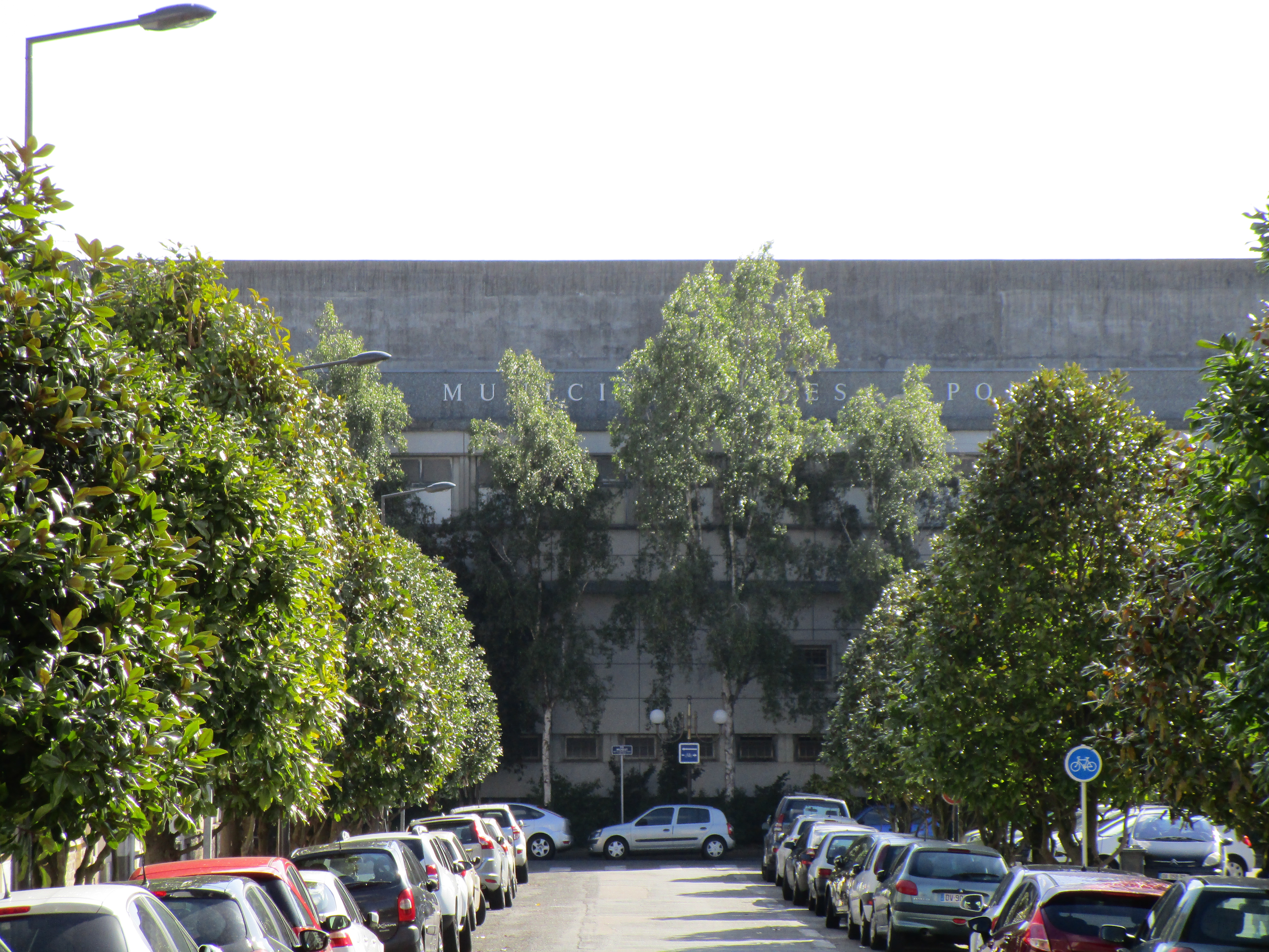 Vue de la patinoire de Tours, dans le quartier du Sanitas